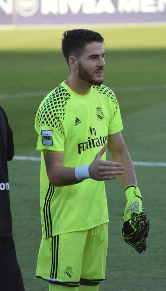 Carlos Abad en la temporada 2015/2016 en el Real Madrid Castilla.